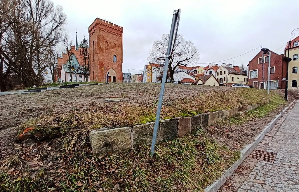 Seminarium nauczycielskie w Braniewie